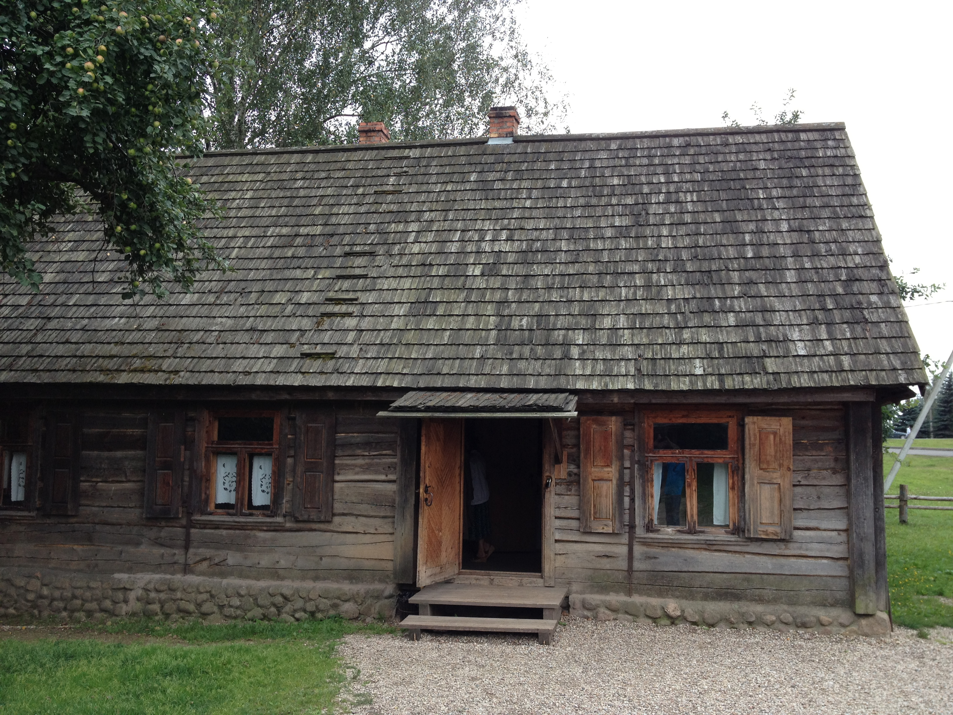 Гостевой дом на старой мельнице в Заславле. This is a photo of Belarusian heritage monument. Reference number: невядомы ( WLM)